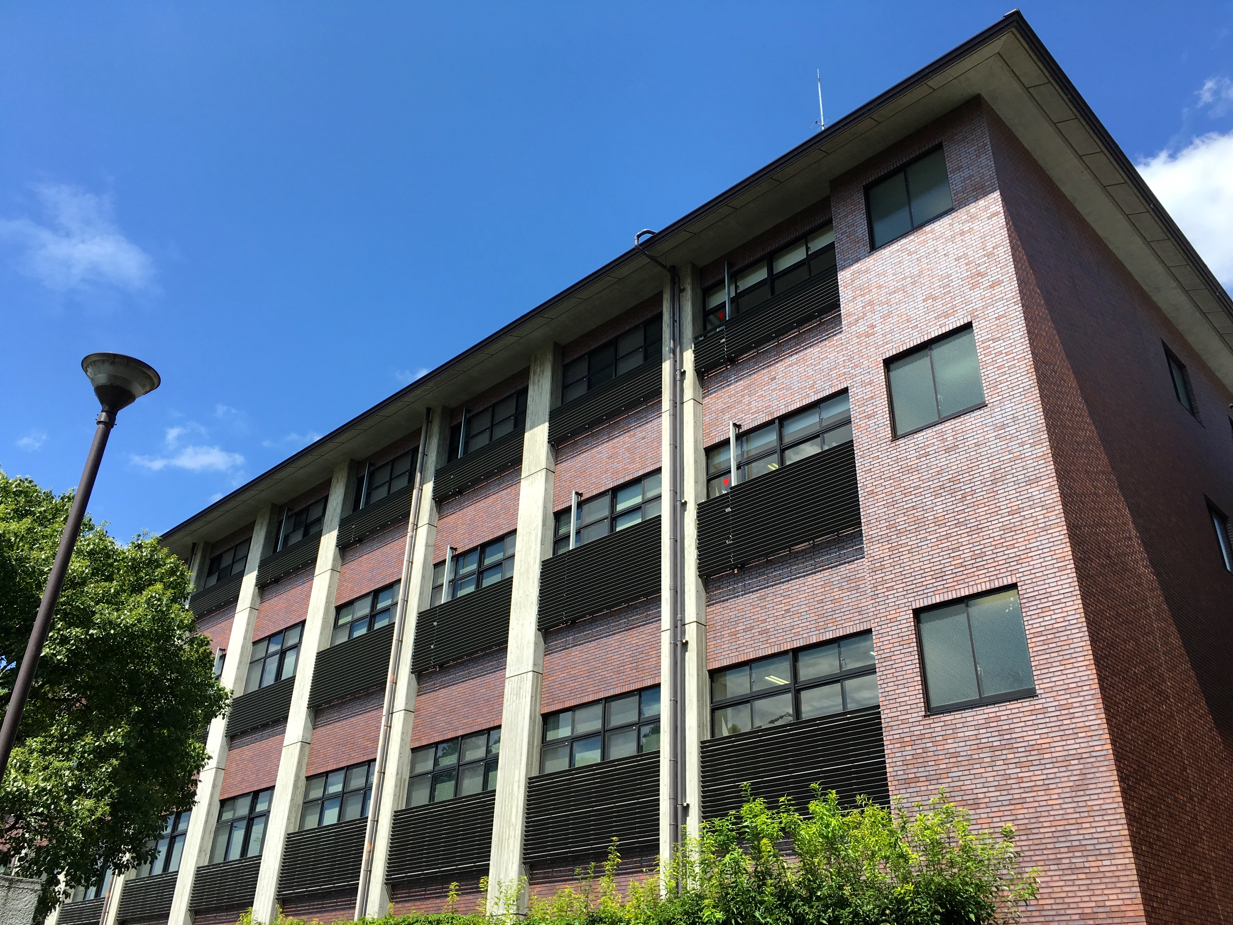 The photo was taken by me on September 10, 2016.